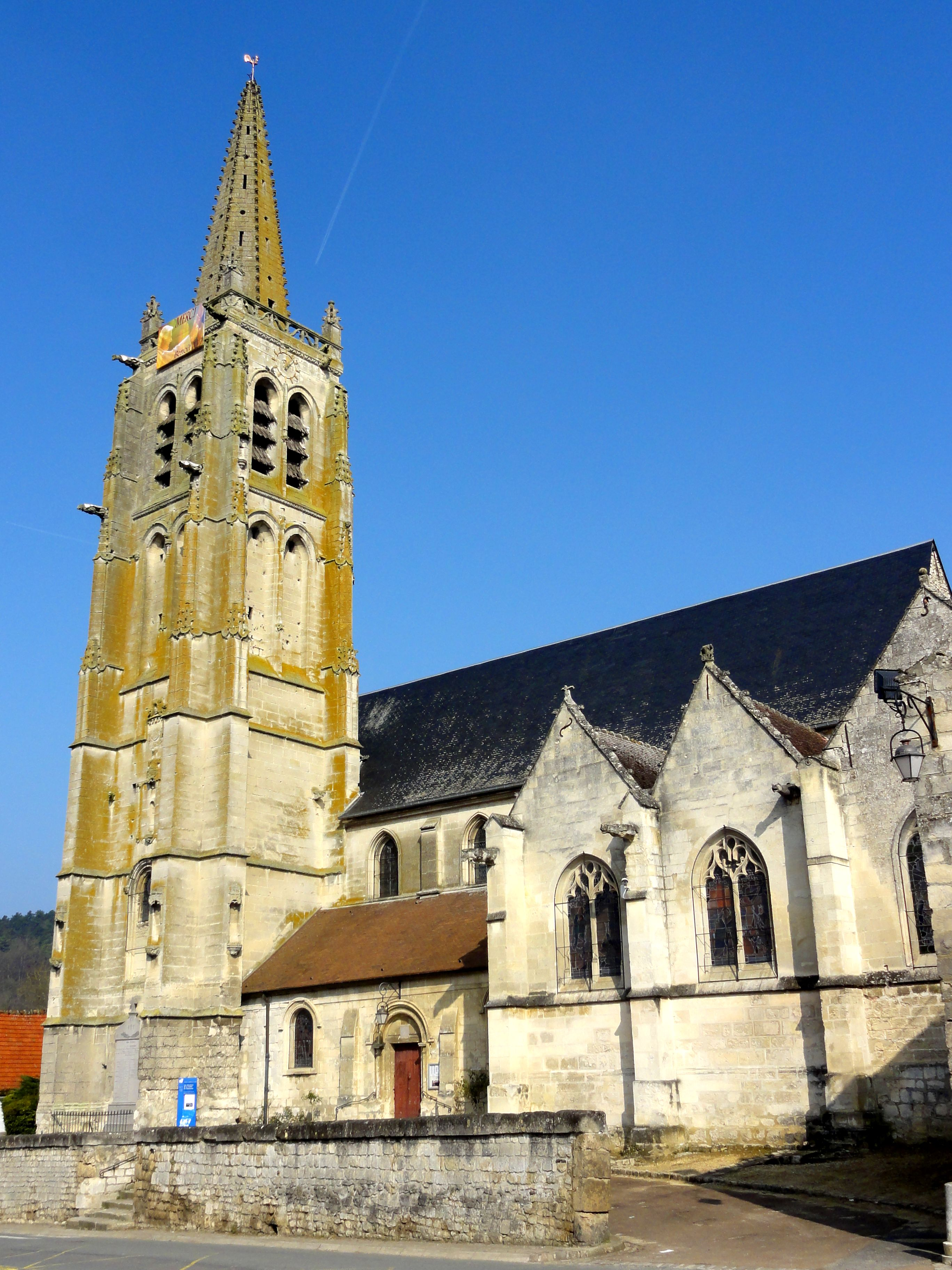 Vue d'ensemble depuis le sud-est, sans le vieux chœur ruiné caché par le mur à droite et sans l'avant-nef se trouvant derrière le clocher.